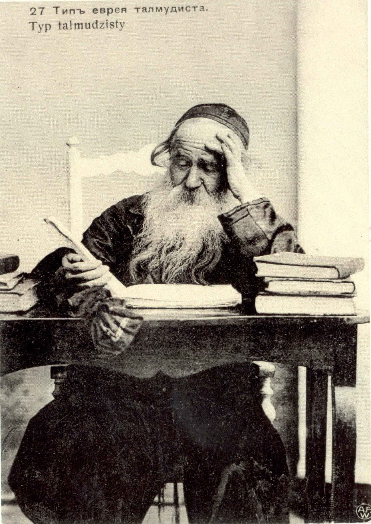 Слуцк. Типичный еврей-талмудист.Беларуская (тарашкевіца): Слуцак. Тып жыда-талмудыста.